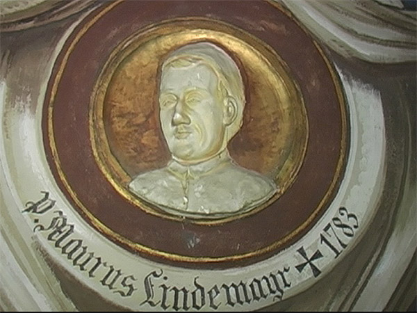 Boarisch: Pater Maurus Lindemayr (1723-1783)